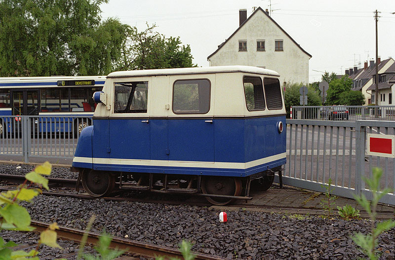 Draisine der RSVG vor dem Sieglarer Betriebshof